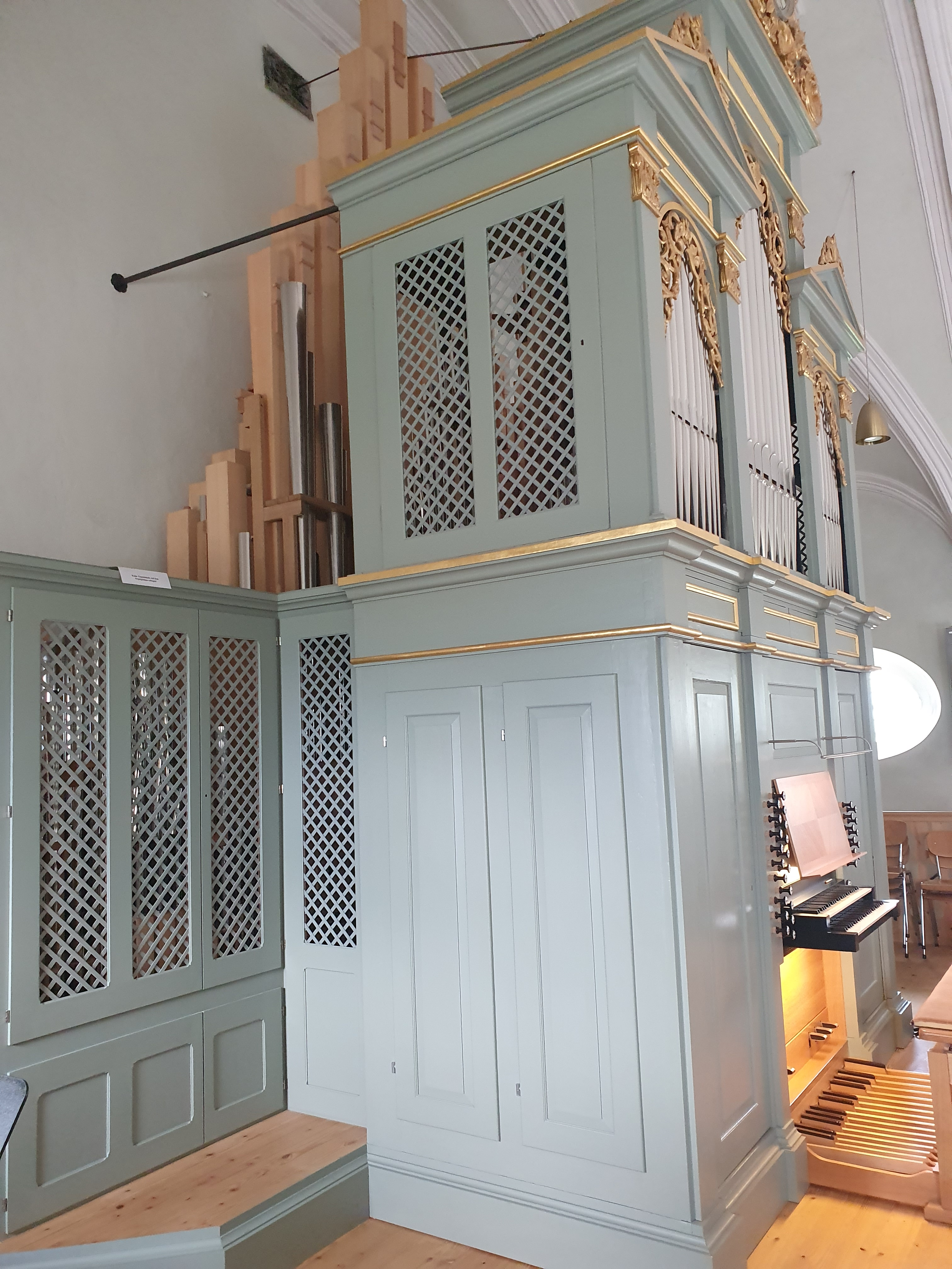 Gehäuse von Matthäus Mauracher d.Ä. 1867, Werk von Johannes Klais 2017, Bergheim